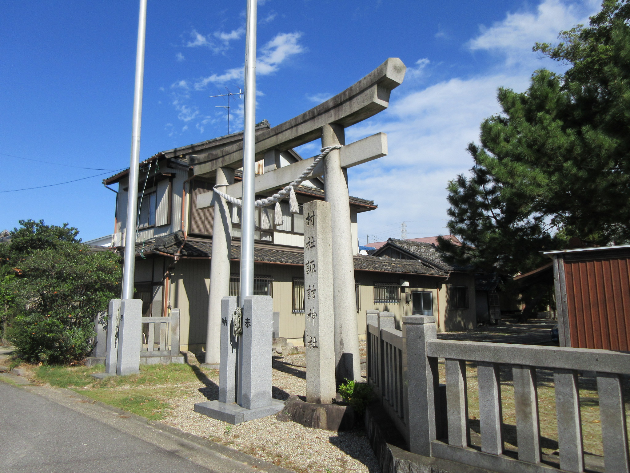 諏訪神社（岡崎市八帖町）